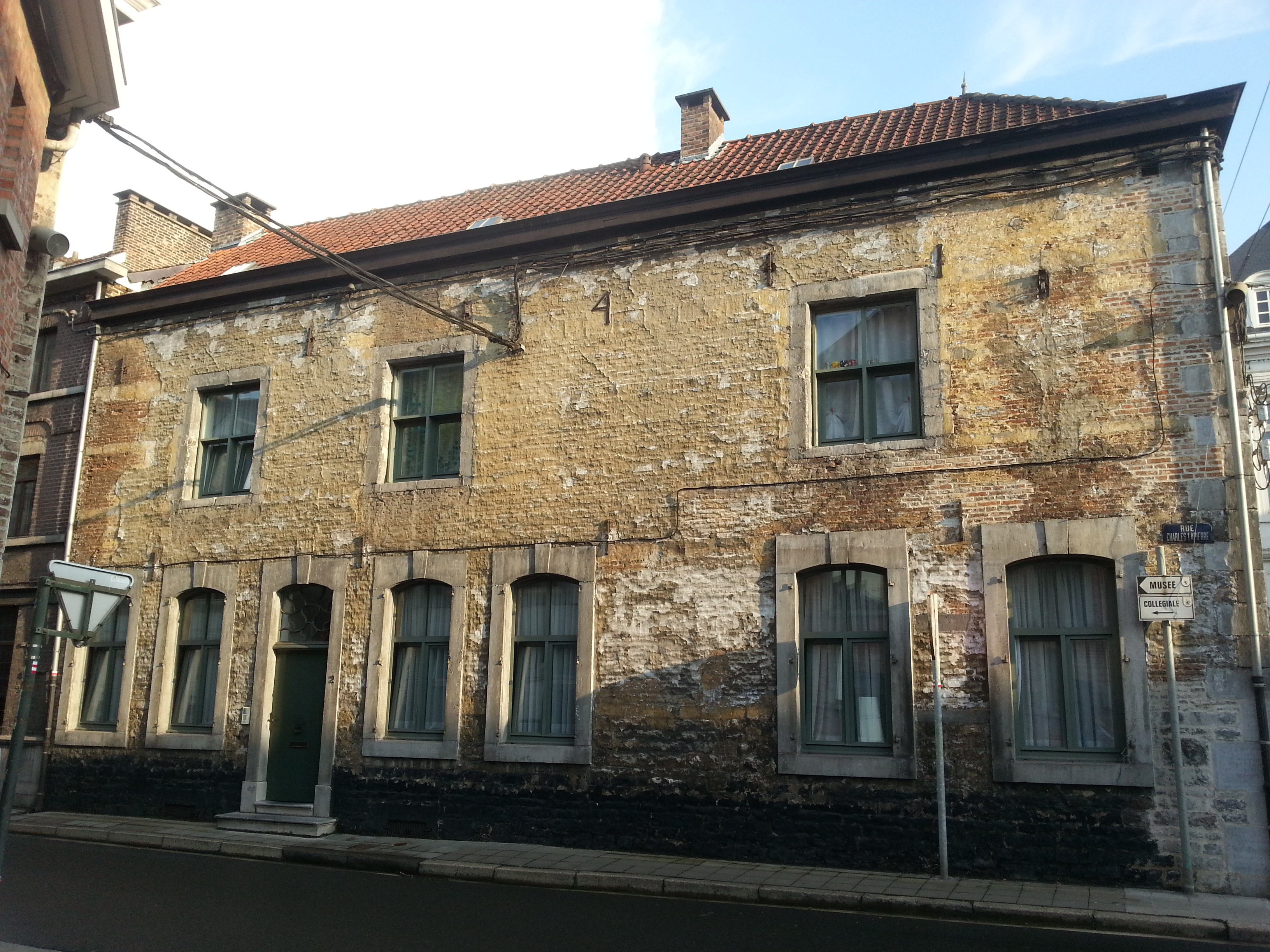 Maison (façades, toitures, à l'exclusion des annexes situées à l'arrière, courette pavée, porte piétonne et mur de clôture)